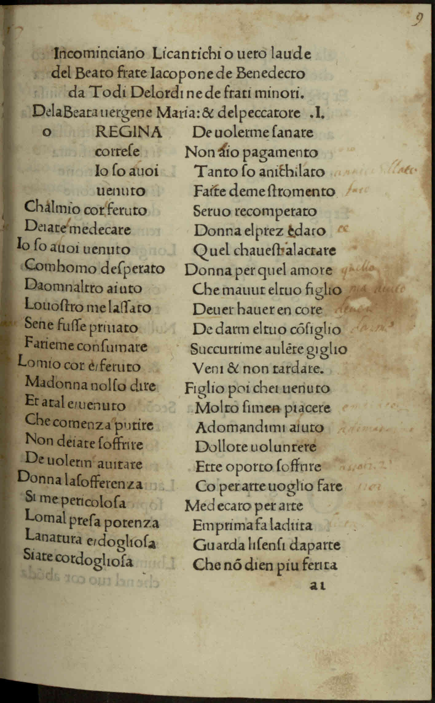 Laude. - in Firenze : sono impresse queste laude per ser Francesco Bonaccorsi, adi ventotto del mese di septembre MCCCCLXXXX. - 142 c. ; a⁸, a-q⁸, r⁶ ; 4°. - E. Barbieri, L’editio princeps di Jacopone da Todi (Firenze, Bonaccorsi, 1490): note bibliologiche, in La Bibliofilía 109 (2007), pp. 105–142. - Errori nella cartulazione manoscritta .